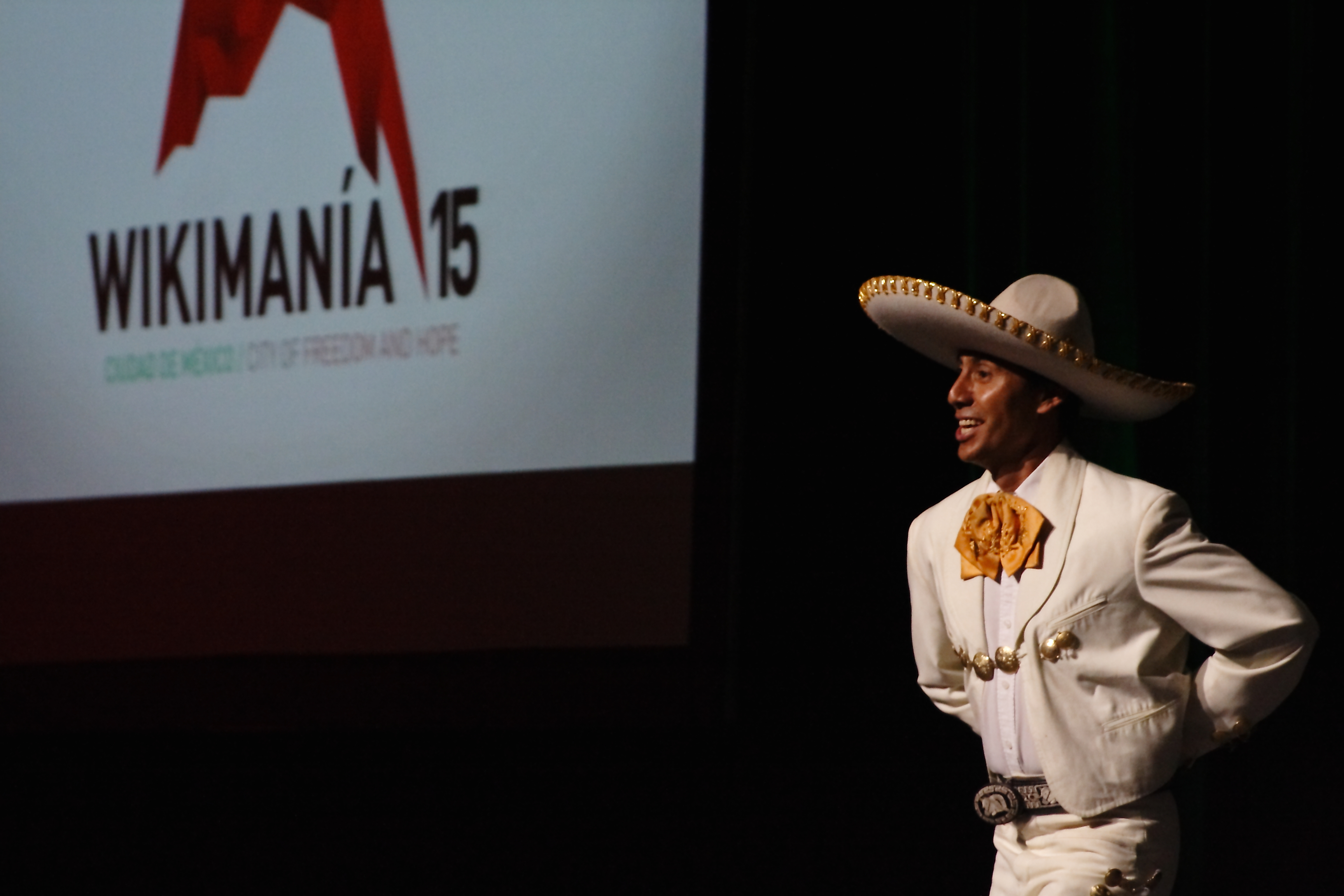 Baile mexicano durante la inauguración de la Wikimanía 2015.